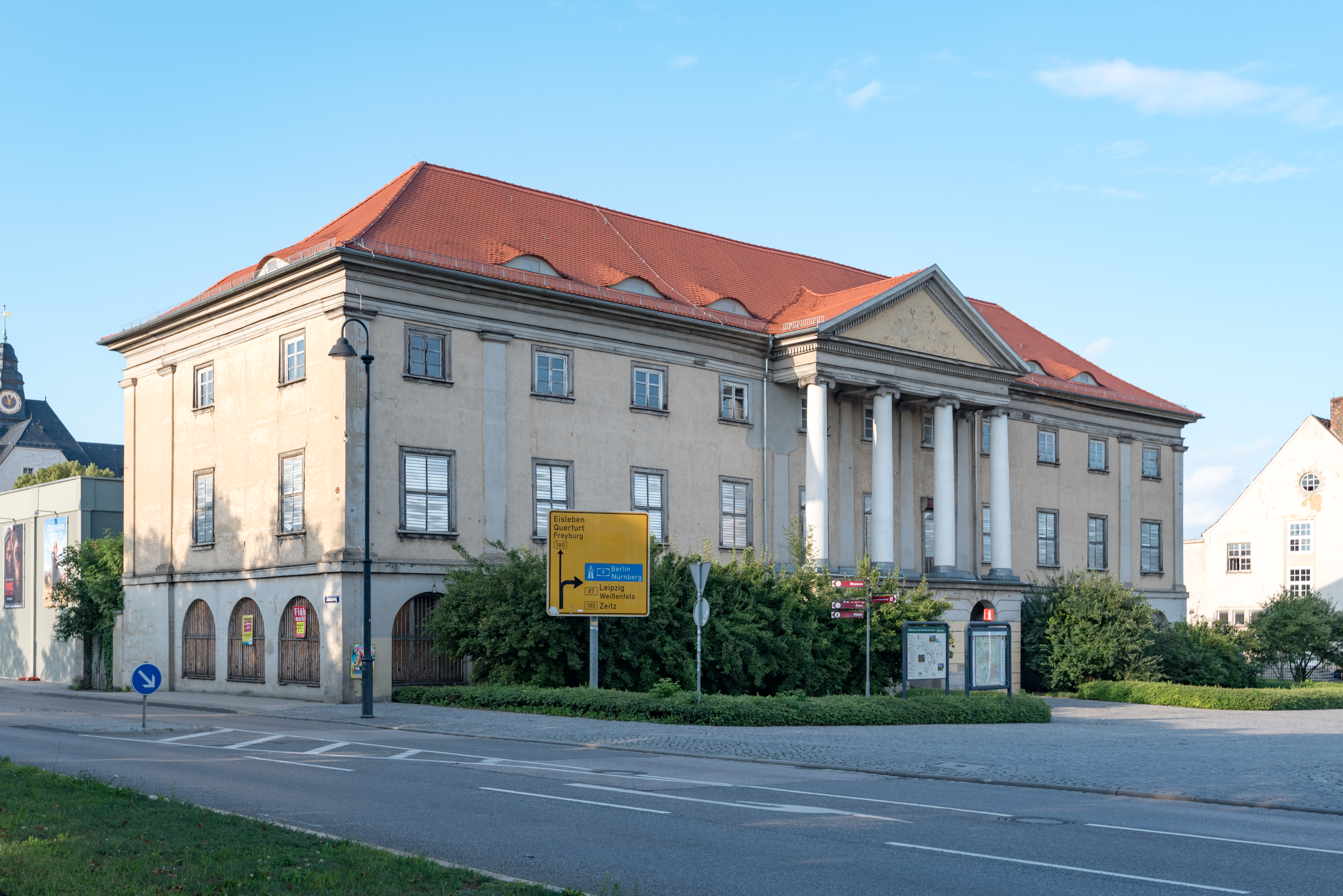 Naumburg (Saale), Jakobsring 4